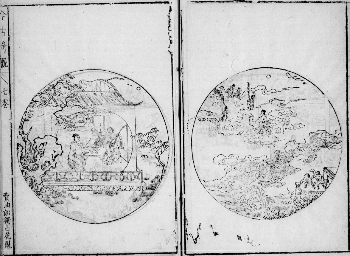 Titre : 今古奇觀 Jin gu qi guan. Merveilles de l'antiquité et des temps modernes. Image de gauche (1/2) : VII, livre 7 賣油郎獨占花魁 Mai you lang du zhan hua khoei. Le vendeur d'huile qui seul possède la reine de beauté. Image de droite (2/2) : VI, livre 6 李謫仙醉草嚇蠻書 Li zhe xian zui cao he man shu. Le poète Li Tai bai. Description : Recueil de 40 contes imprimé par les soins de Bao weng lao ren et de Mo han zhai ; gravé à Wu, au pavillon Bao han (époque des Ming). Préface par Xiao hua zhu ren, de Gu su. Notes en haut des pages ; illustrations soignées, une par nouvelle. Description : Provenant de la bibliothèque de l'Arsenal. Source : Bibliothèque nationale de France, Département des manuscrits, Chinois 4259